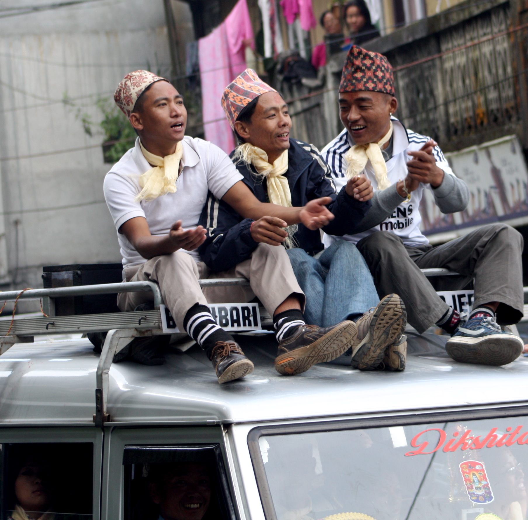 Singing Gorkhas in Darjeeling.